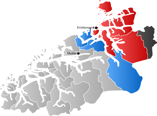 Markedsgrunnlag for Kristiansund lufthavn, Kvernberget